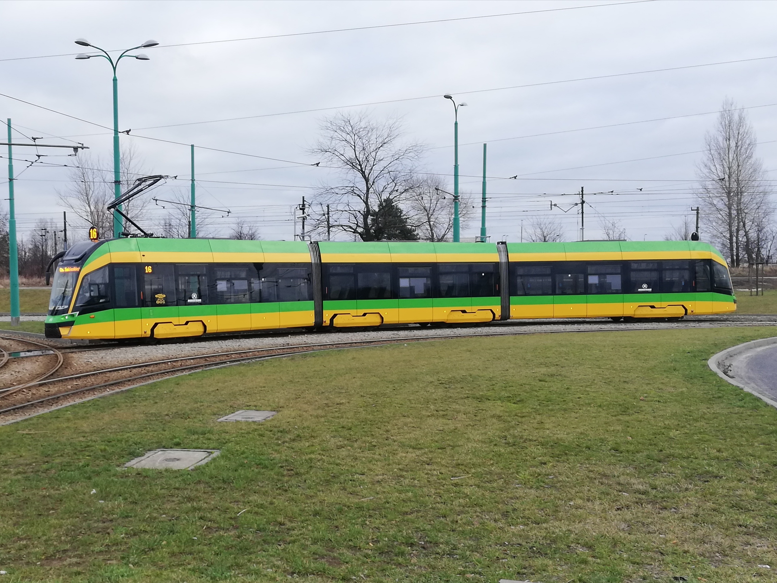 Pętla Franowo